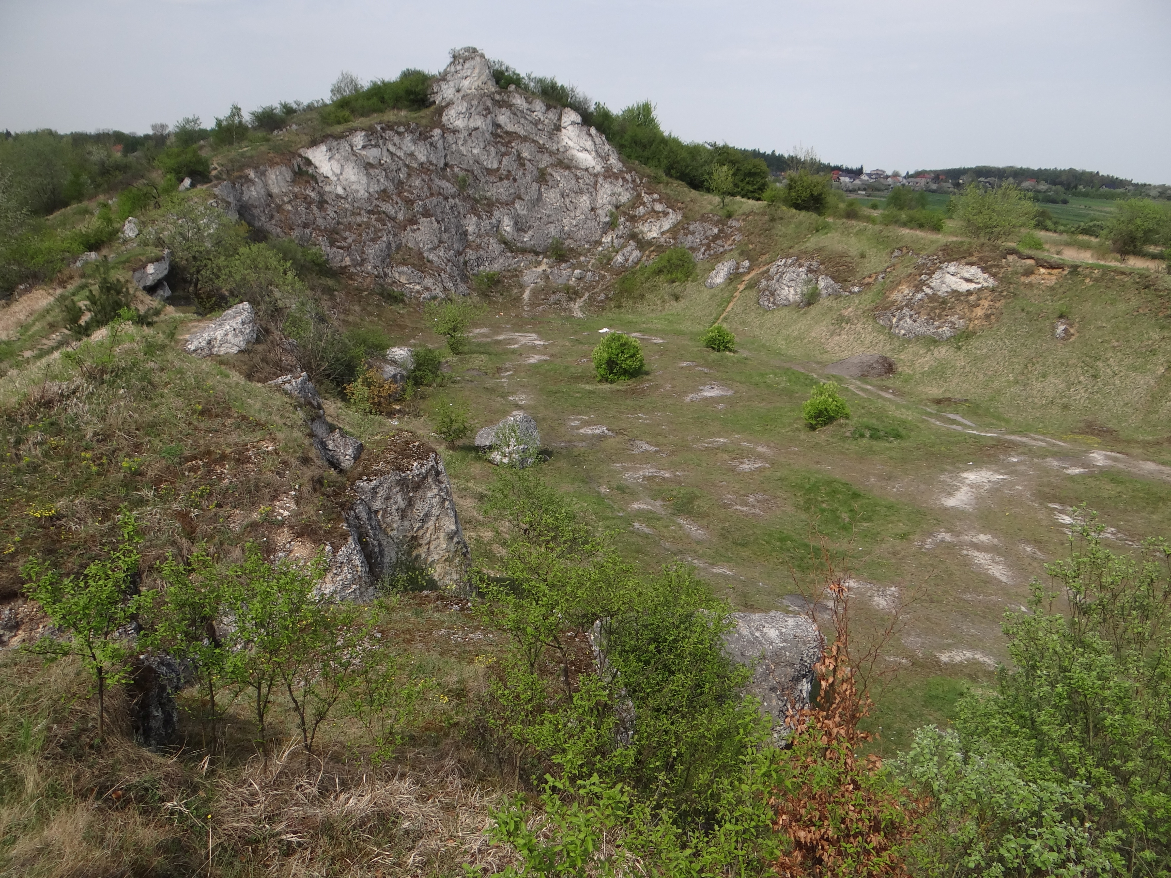 Duże Skałki w Czajowicach